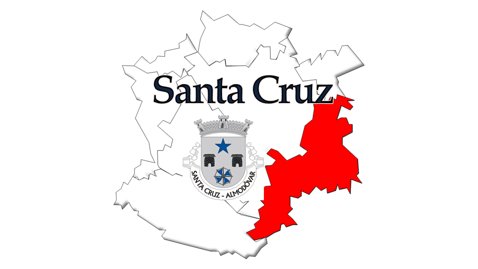 Evolução da População